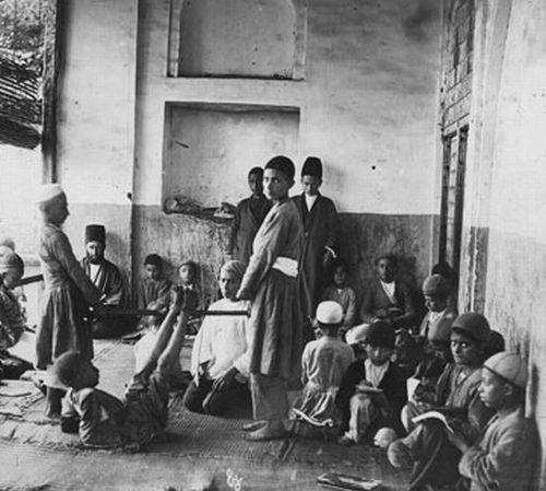 فلک کردن یکی از دانش‌آموزان در مکتب‌خانه در ایران